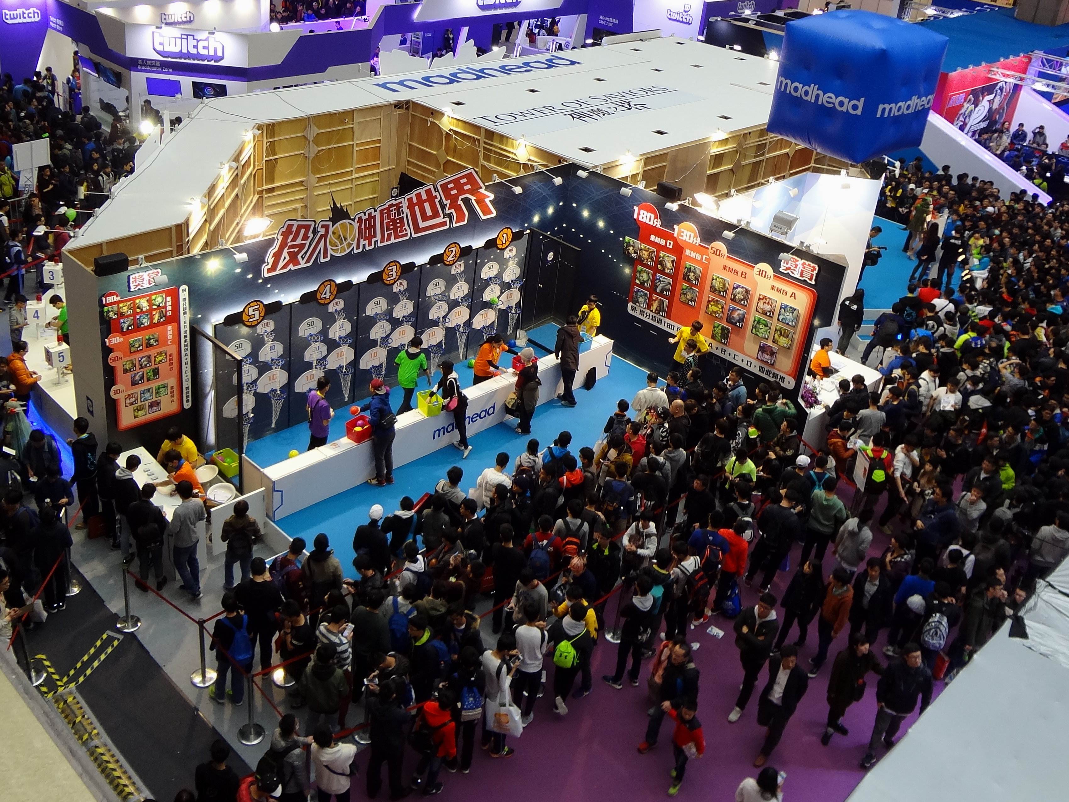 2017臺北國際電玩展，Madhead攤位俯瞰圖。